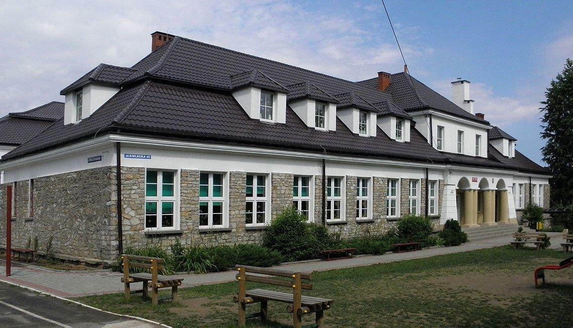 Stary budynek szkoły.